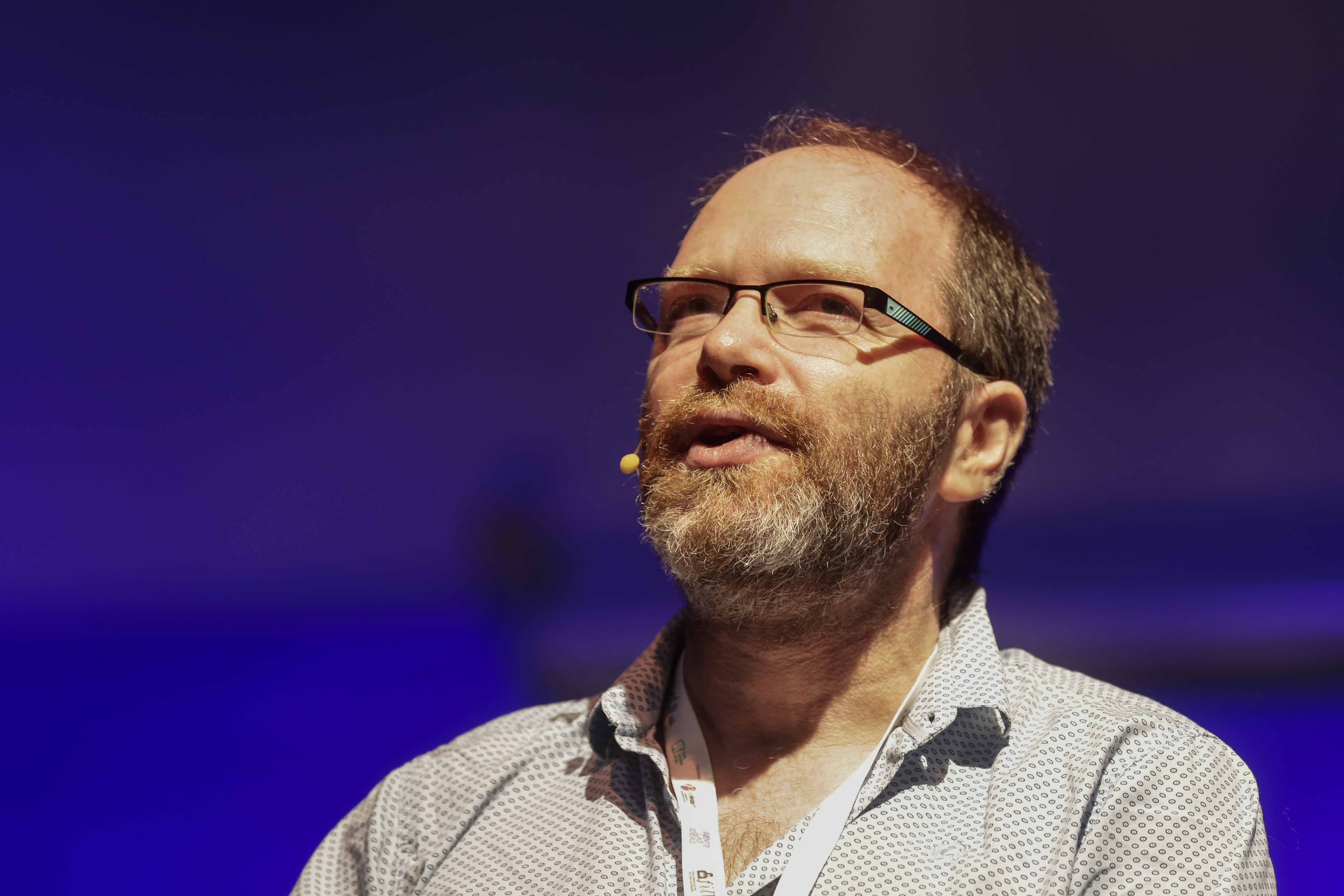 Diego Golombek habló sobre las emociones más intensas desde la ciencia Foto: Soledad Amarilla / Ministerio de Cultura la Nación